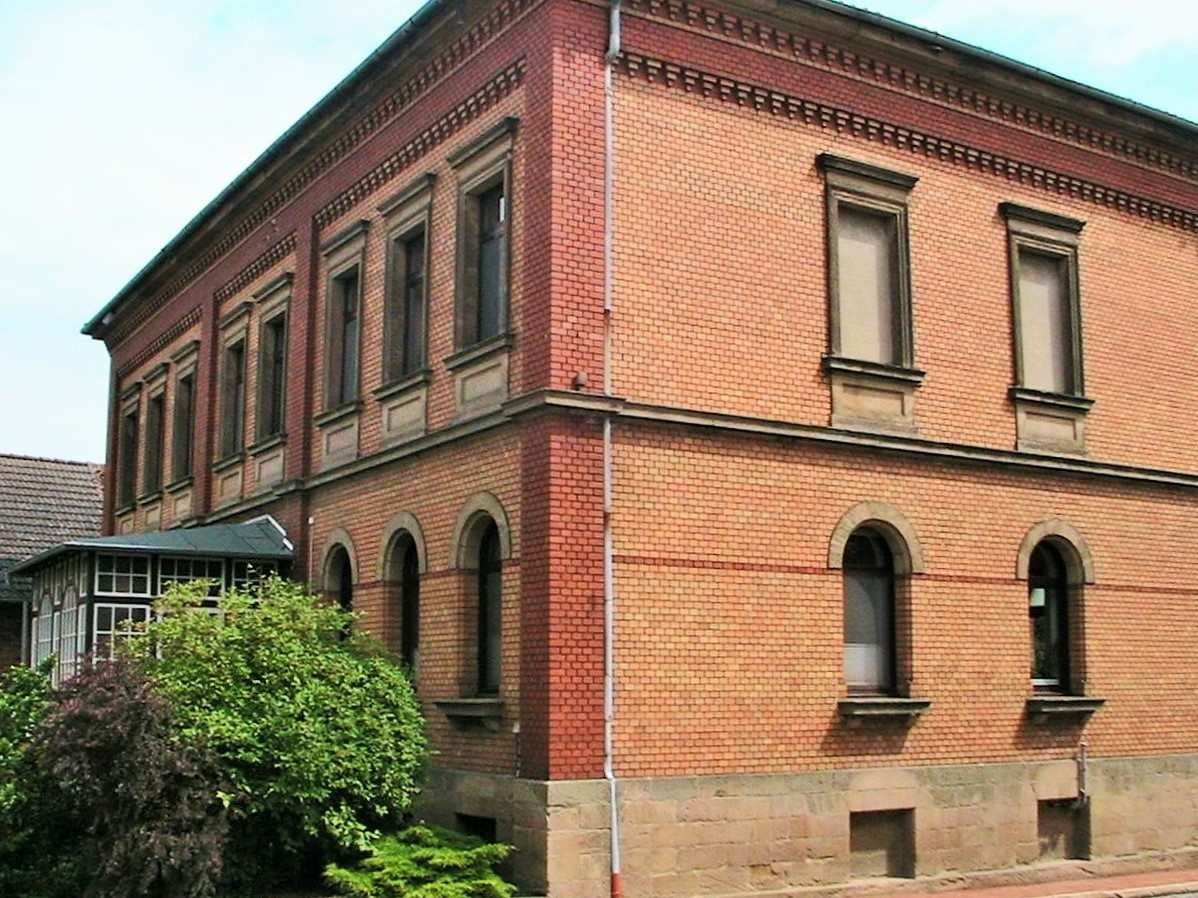 Bauern-Villa in Barnstorf (Uehrde), sogenannte "Rübenburg"